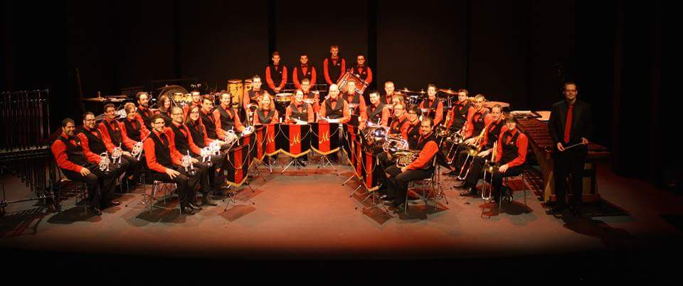 Photo d'ensemble de l'Ensemble de Cuivres Mélodia en avril 2015